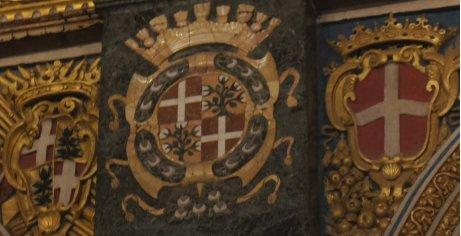 Blason de Rafael et Nicolas Cotoner, 59e et 60e Grands Maîtres de l’Ordre de Saint-Jean de Jérusalem: Ecartelé, aux 1 et 4, de la Religion ; aux 2 et 3, d’or à un cotonier, arraché, de cinq rameaux de sinople, chaque rameau fleuri d’argent à son extrêmité.